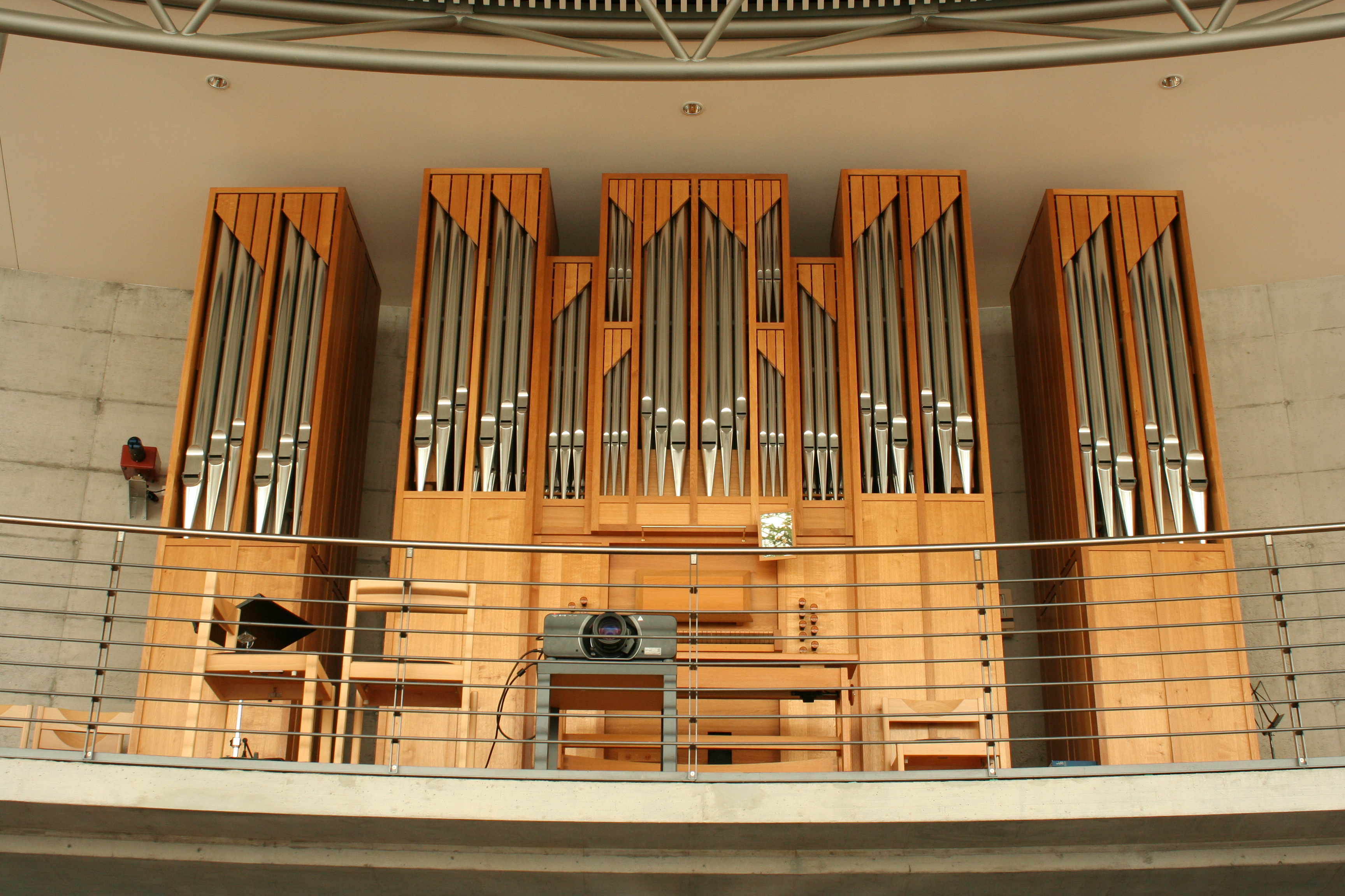 Römisch-katholische Pfarrkirche Hl. Dreifaltigkeit Zollikon, Orgel